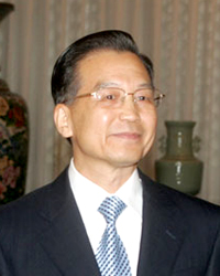 Wen Jiabao (温家宝), Chinese Premier